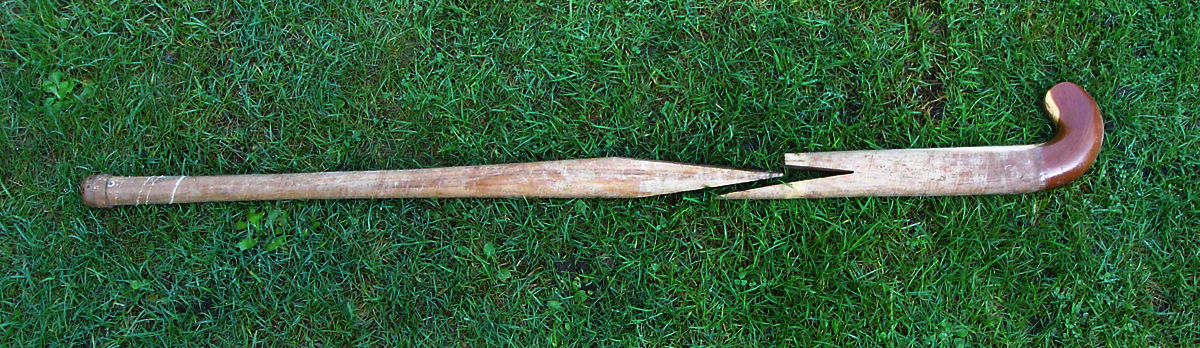 Ein gebrochener Holzhockeyschläger ohne Ummantelung